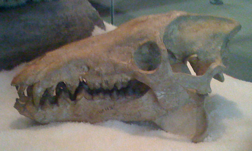 Unidentified entelodont skull